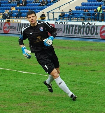 Максим Александрович Старцев — украинский футболист.